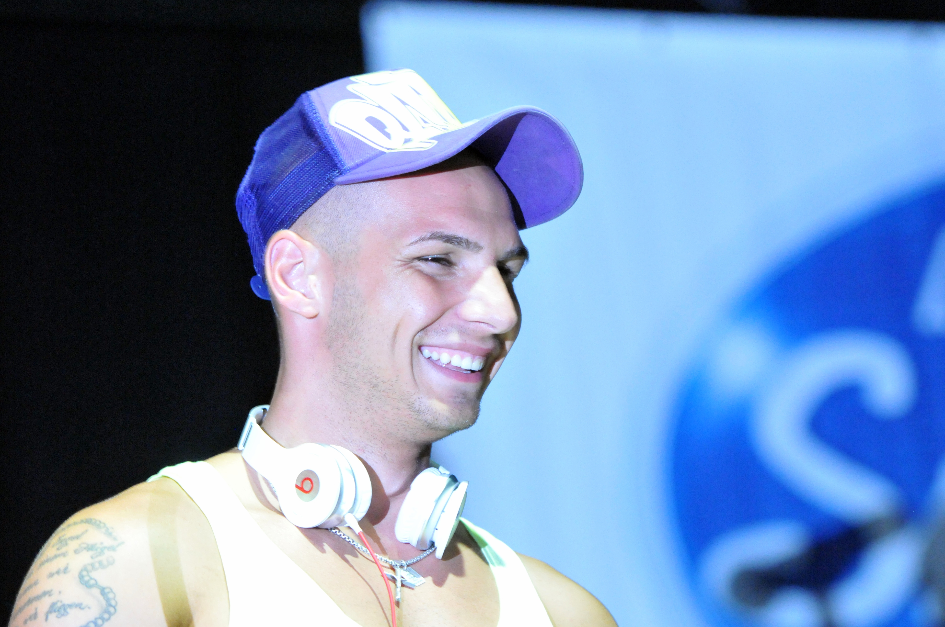 DSDS - Live on Tour. 27. Juli 2014, Stadthalle Wien.